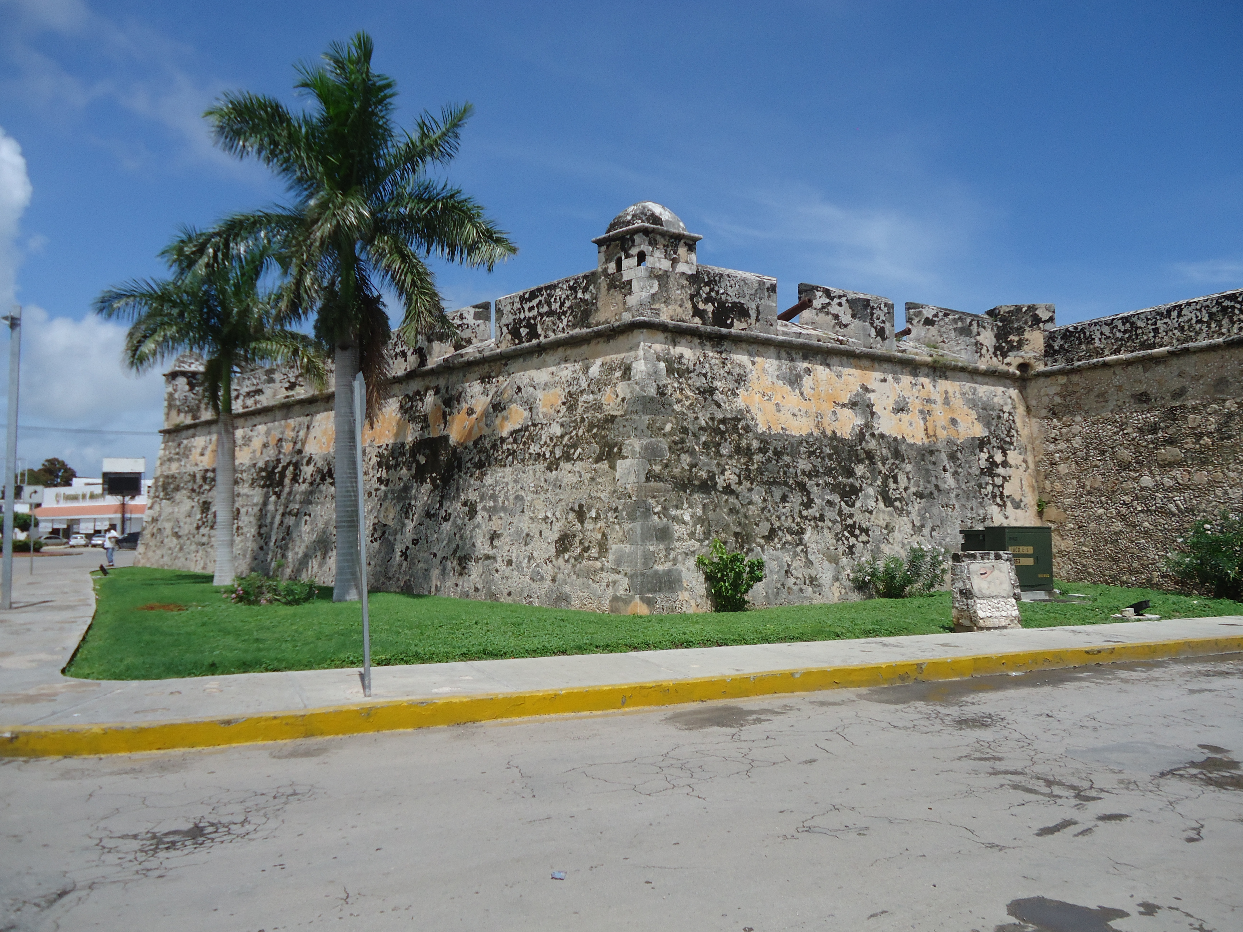 Fotografía del Baluarte de Juan, San Francisco de Campeche, Campeche